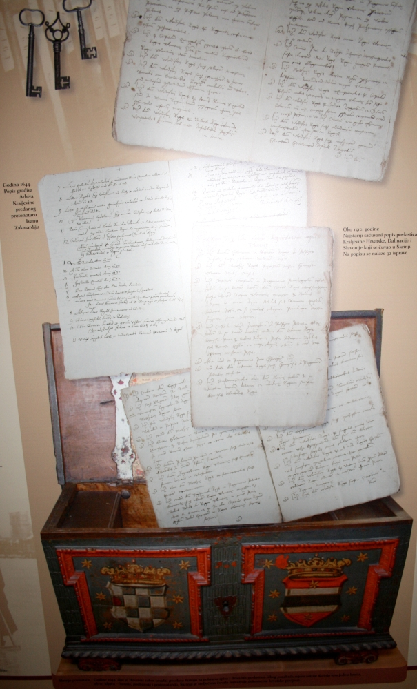 snimljeno tijekom Noći muzeja u Hrvatskom državnom Arhivu u Zagrebu